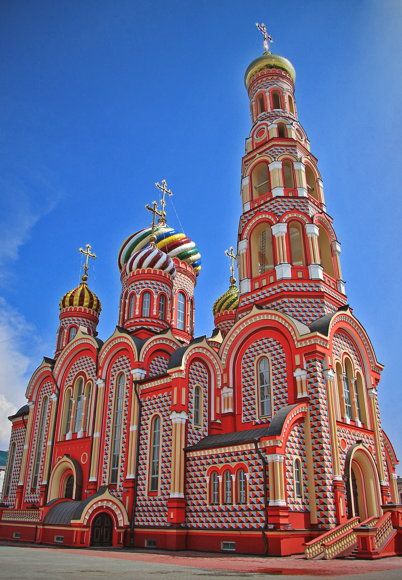 Вознесенский собор женского Вознесенского монастыря г. Тамбова